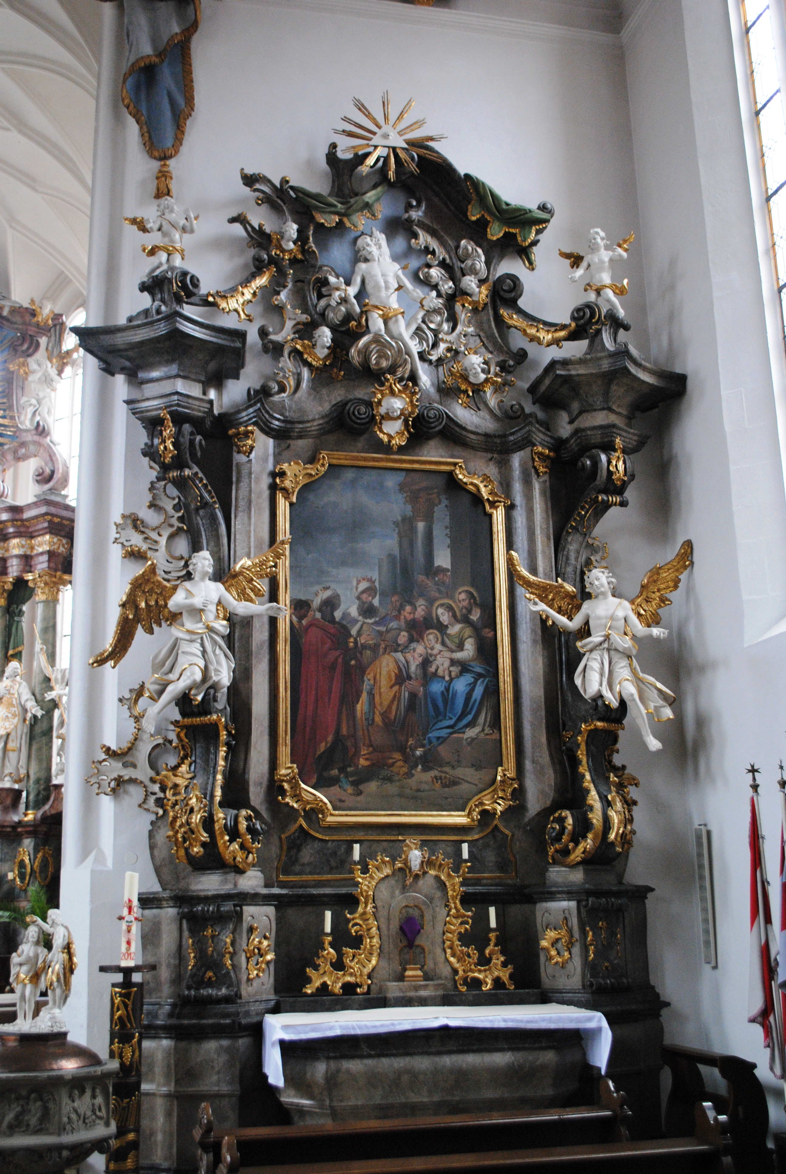 Rechter Seitenaltar, St. Bartholomäus, Volkach, "Anbetung der Heiligen Drei Könige", Peter Geist 1853.